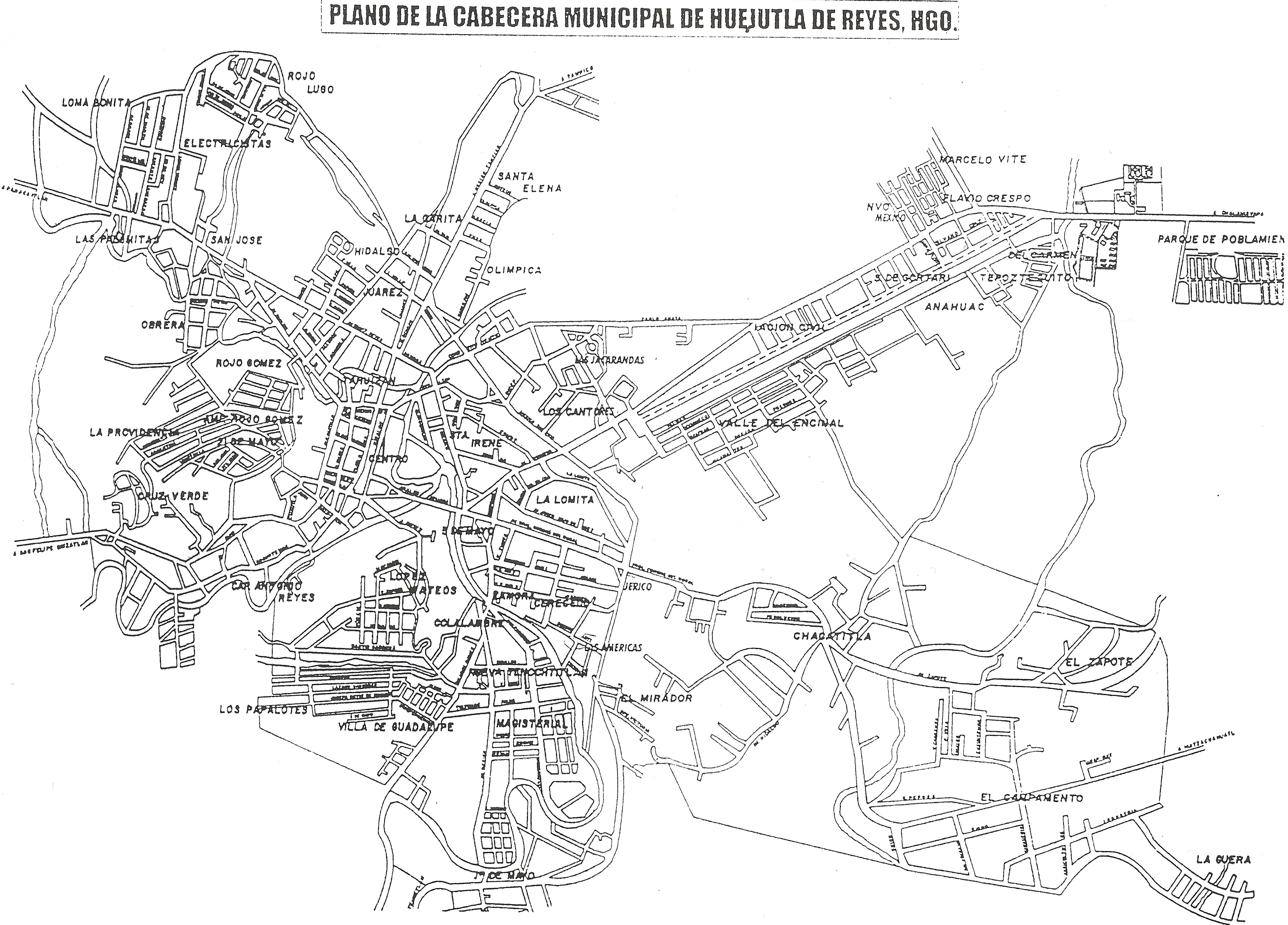 Mapa Huejutla